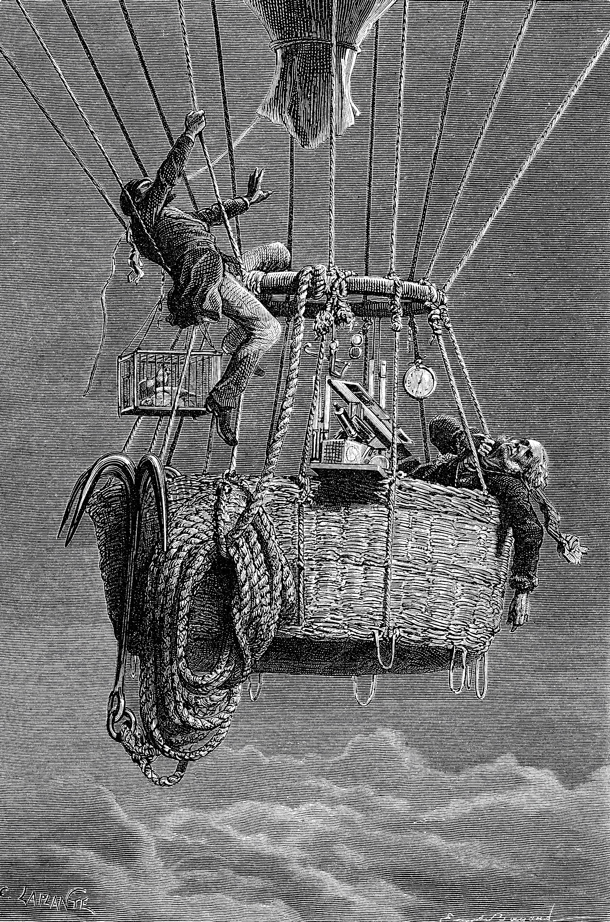 Glaisher, ohnmächtig in seiner Ballongondel in einer Höhe von [fast] 11000 m [ü/M.]. James Gleisher und Henry Tracey Coxwell während ihres in Wolverhampton gestarteten Rekordballfluges vom 5. September 1862. Zeitgenössische Zeitungsillustration aus den Illustrated London News